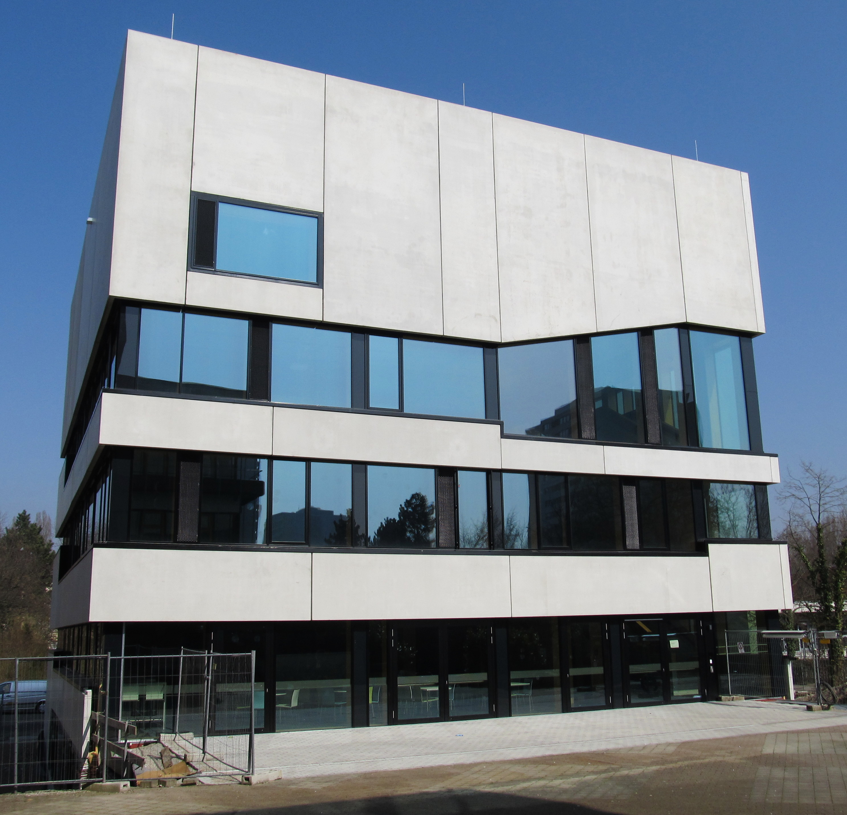 Neubau der Evangelischen Hochschule Freiburg